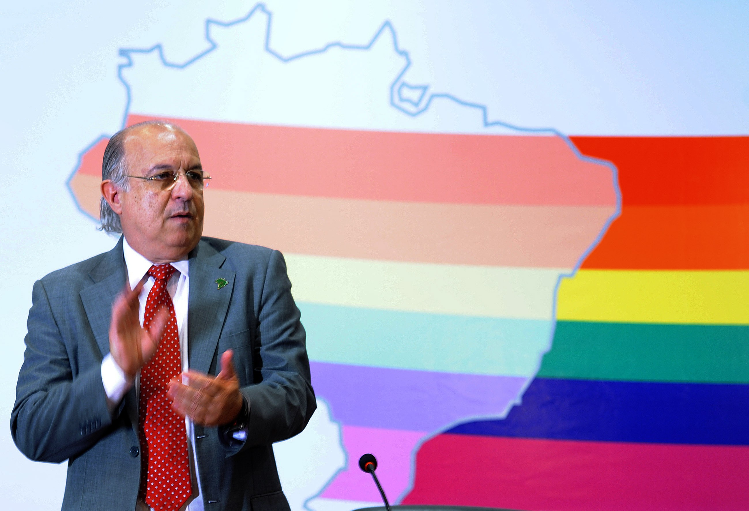 ministro da Secretaria Especial de Direitos Humanos, Paulo Vannuchi